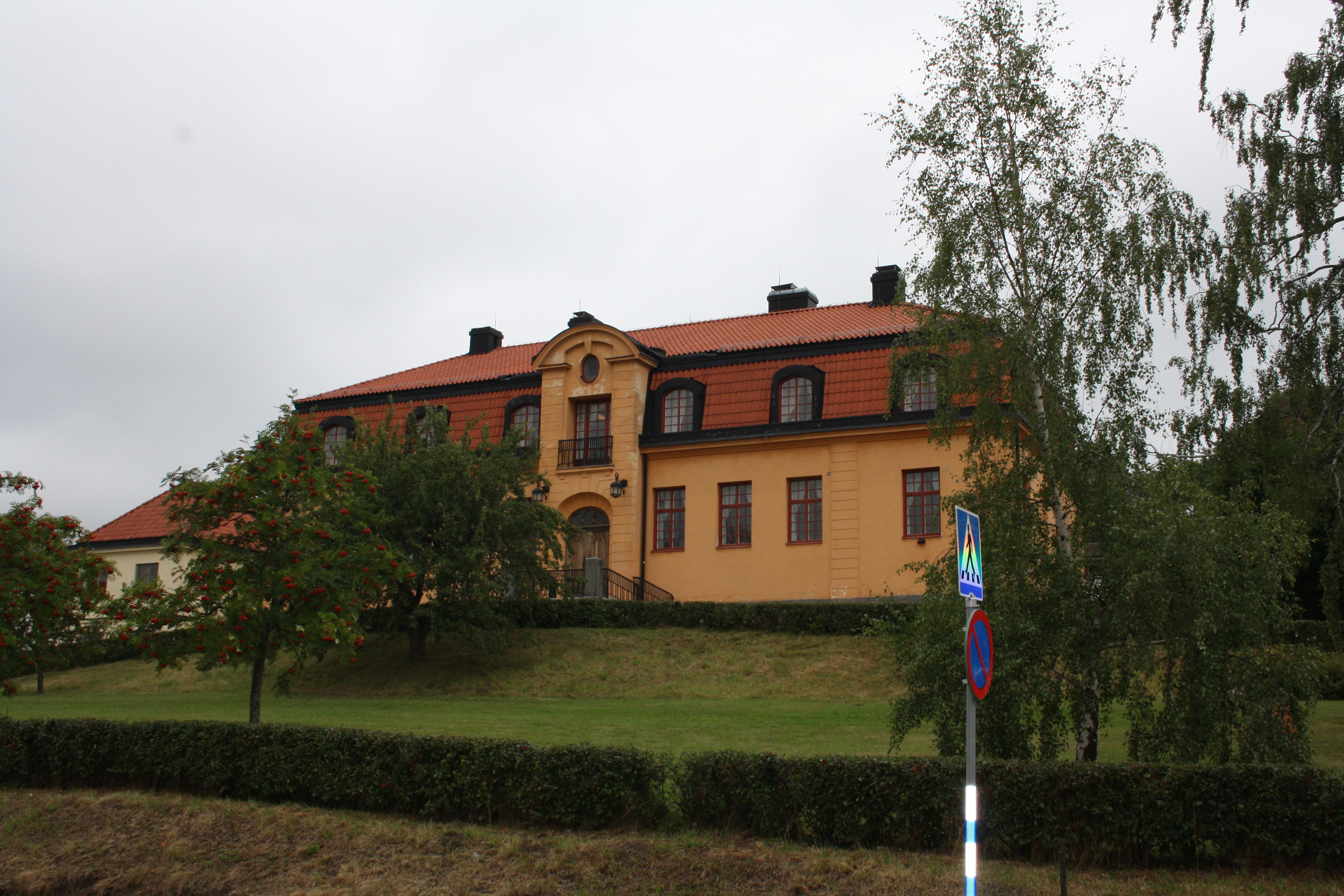 Norrtälje Tingsrätt. Byggnaden uppfördes som tingshus för Mellersta Roslags domsaga Invigningen av tingshuset ägde rum i september 1912. Arkitekter Hagström & Ekman